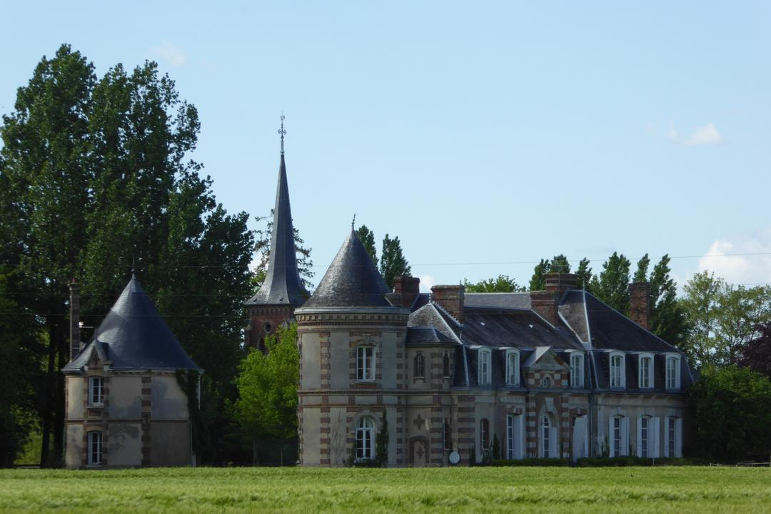 Marbeuf (Eure) : le château ; le clocher de l'église en arrière-plan.